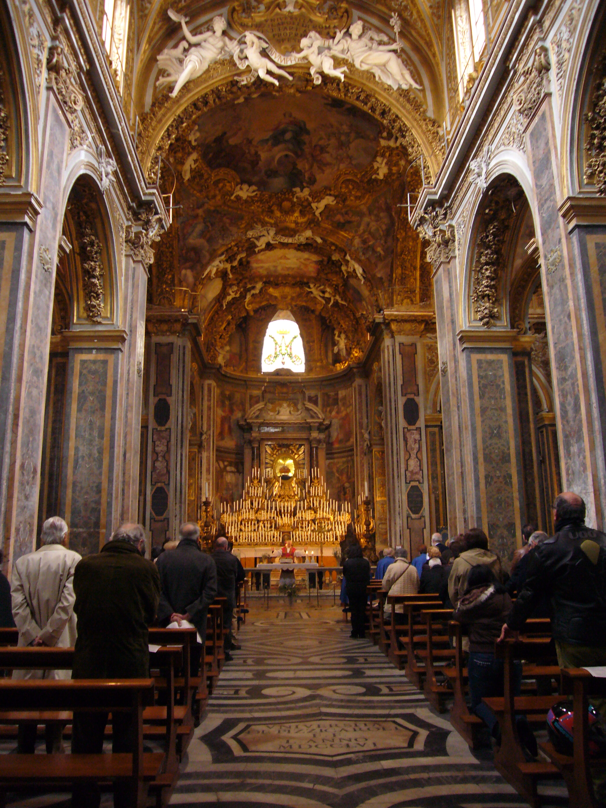 Roma, Santa Maria dell'Orto a Trastevere: interno